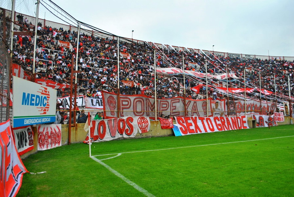 Hinchada Sexto Grande